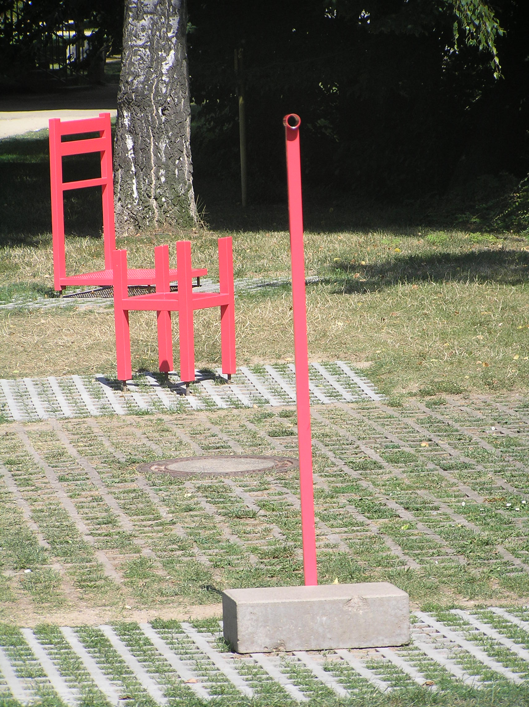 Beuchet-Stuhl, Teil des Optikparcours in Wetzlar. Der "Stuhl" besteht aus drei verschiedenen Elementen, die jeweils einige Meter Abstand haben. Betrachtet man ihn durch das kleine Rohr am Ende, so erscheint er als ein vollständiger Stuhl. Dieses Bild zeigt die Einzelteile.